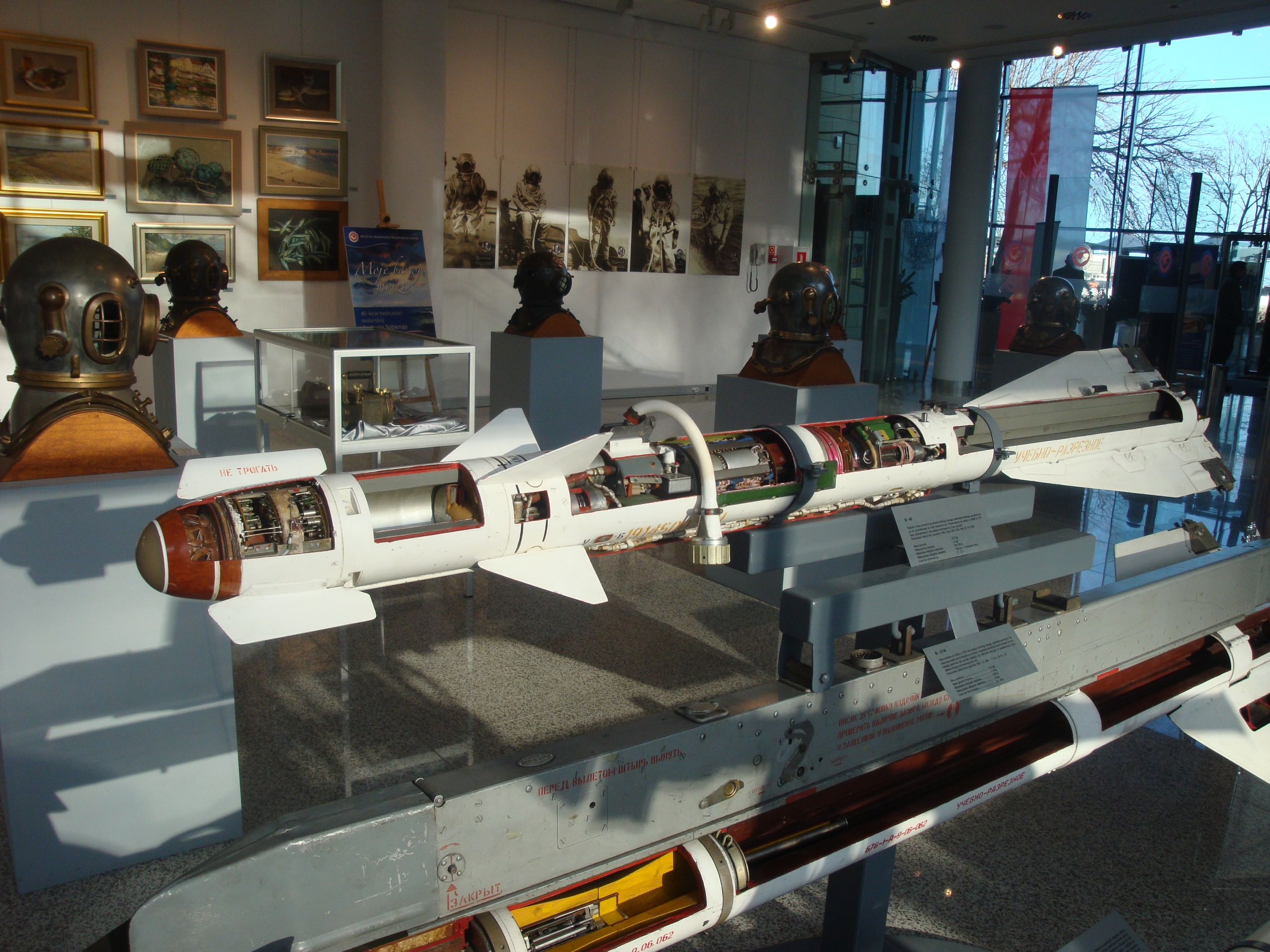 Rakiety R-60 i R-13 M na wystawie w Muzeum Marynarki Wojennej w Gdyni.